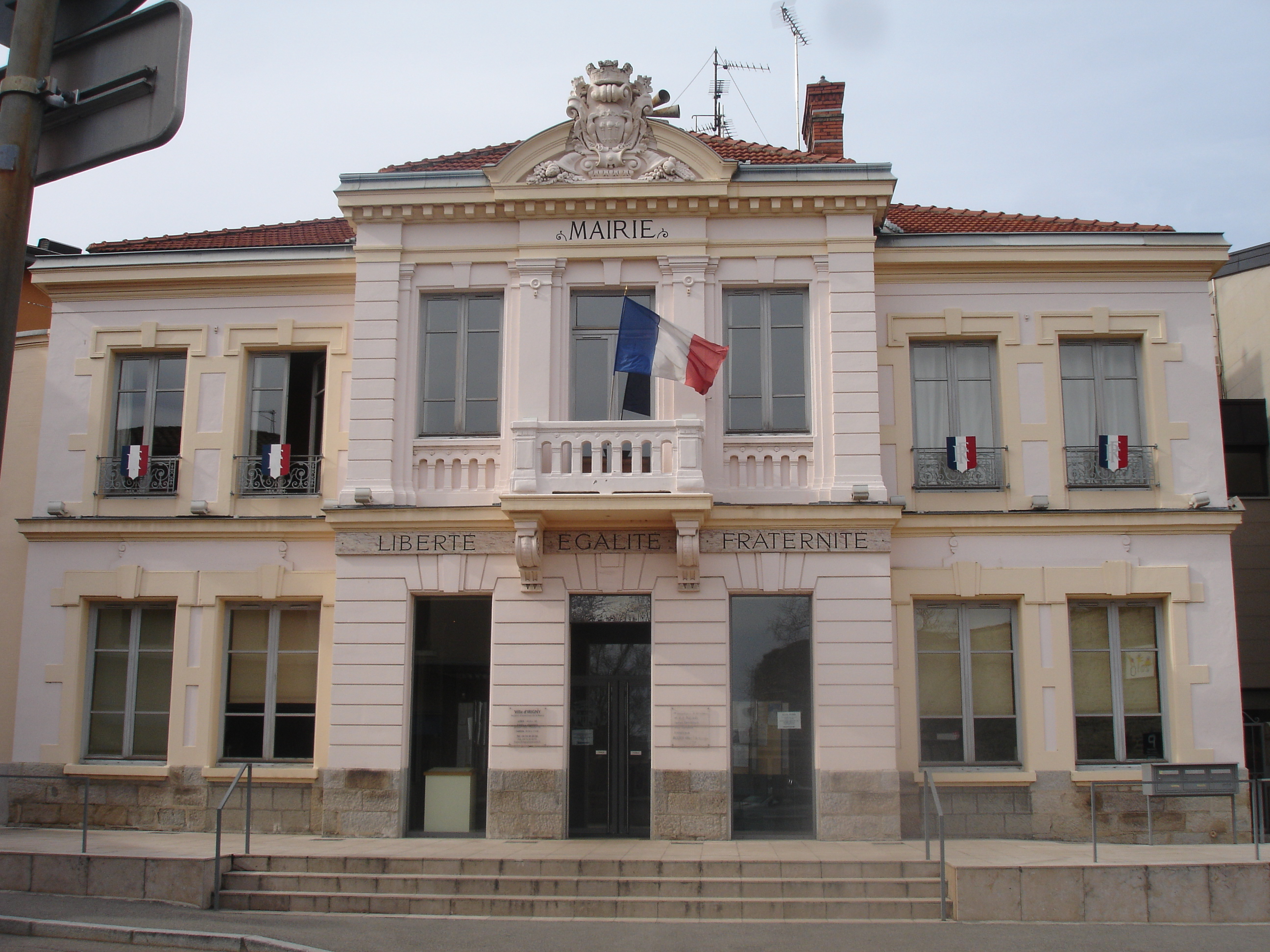 Irigny (69) : La mairie